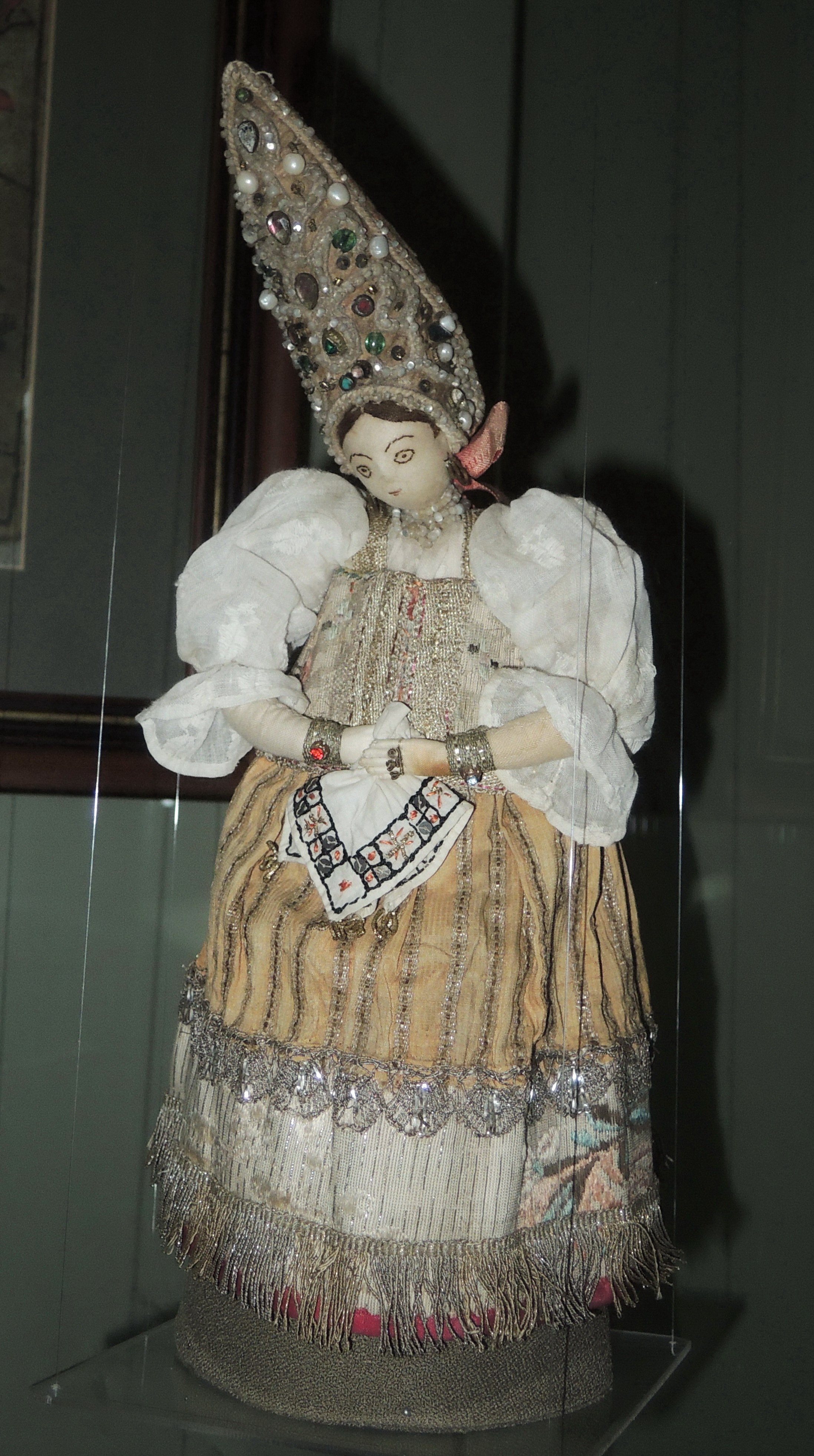 Кукла в праздничном костюме Костромской губернии. Россия. 2-я пол. 18 века. Шелк, полотно, рубленый перламутр, стекло, серебряное кружево. ГИМ